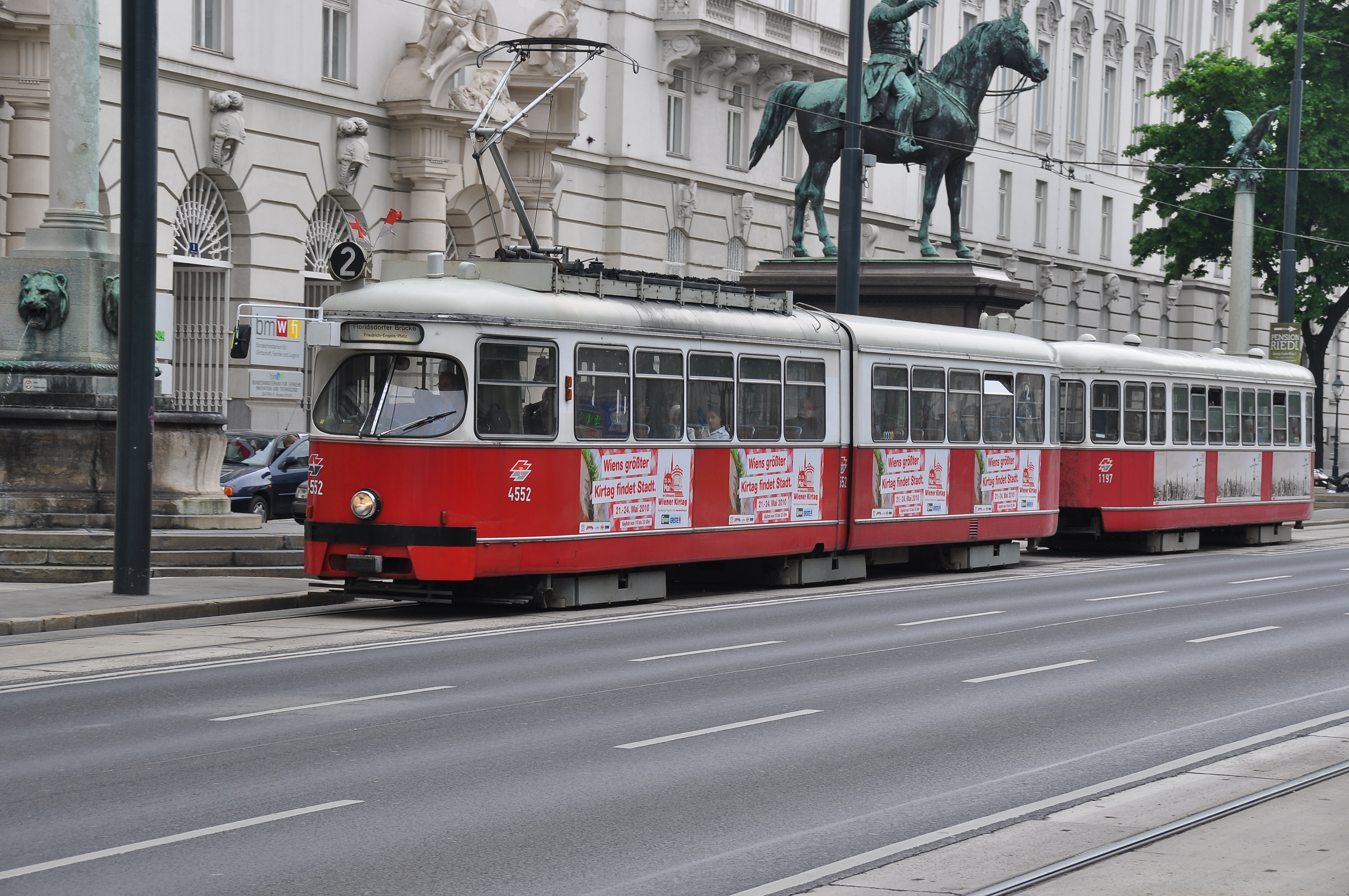 EGU 2010, Vienna